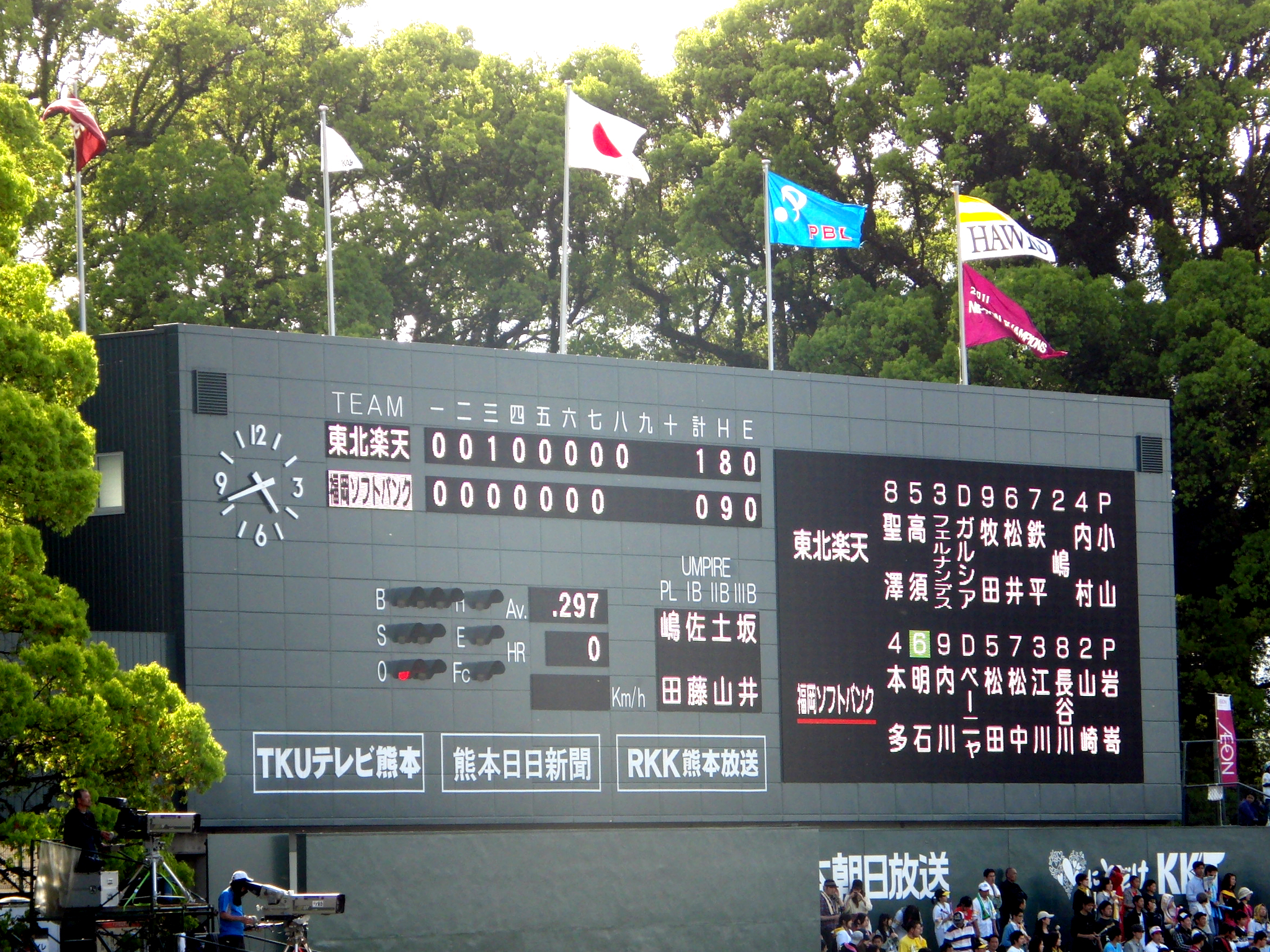 藤崎台県営野球場スコアボード